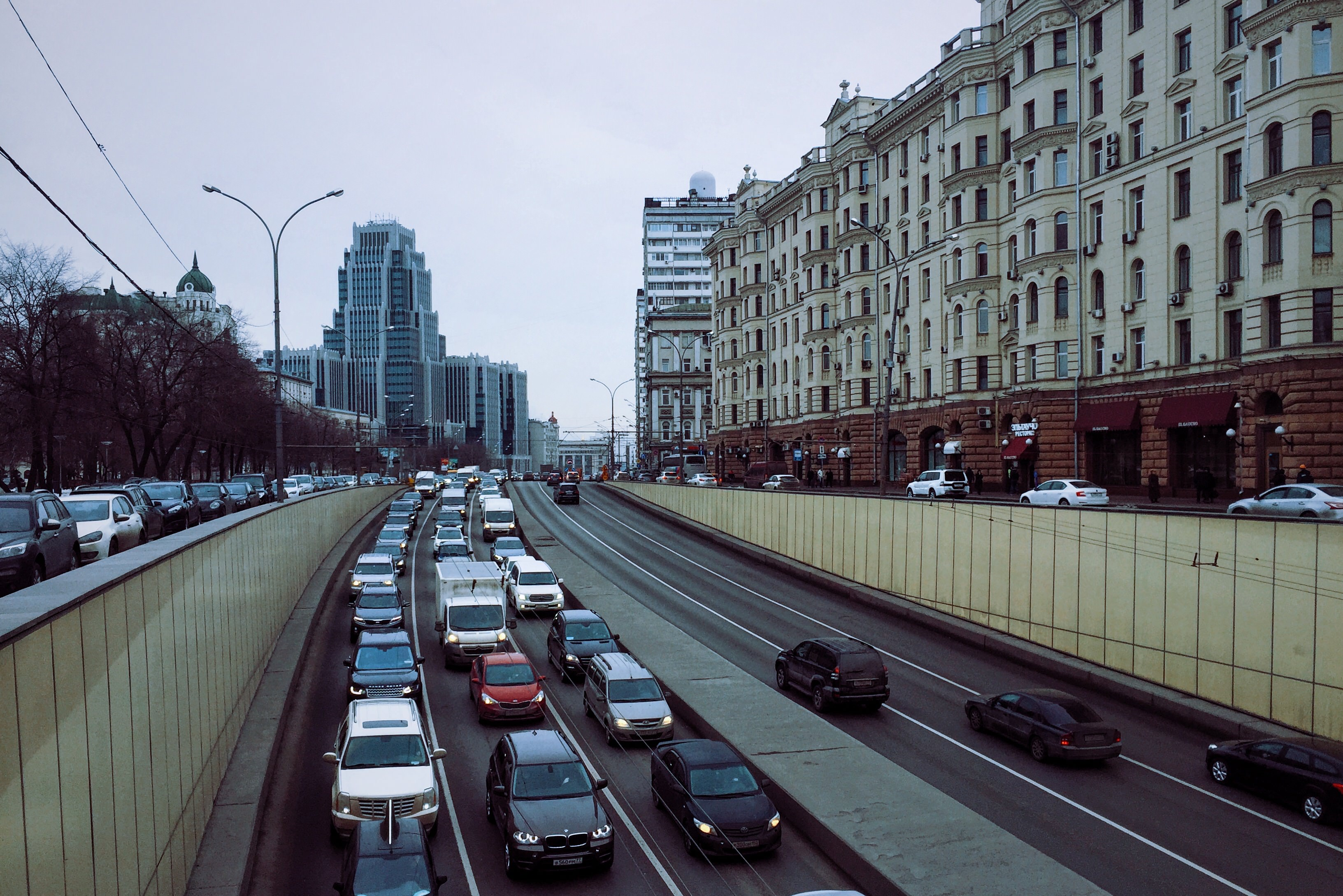 Садовая-Триумфальная Moscow in 2016; Москва в 2016